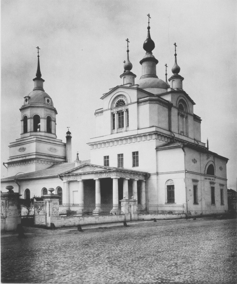 Храм Покрова Пресвятой Богородицы в Красном селе